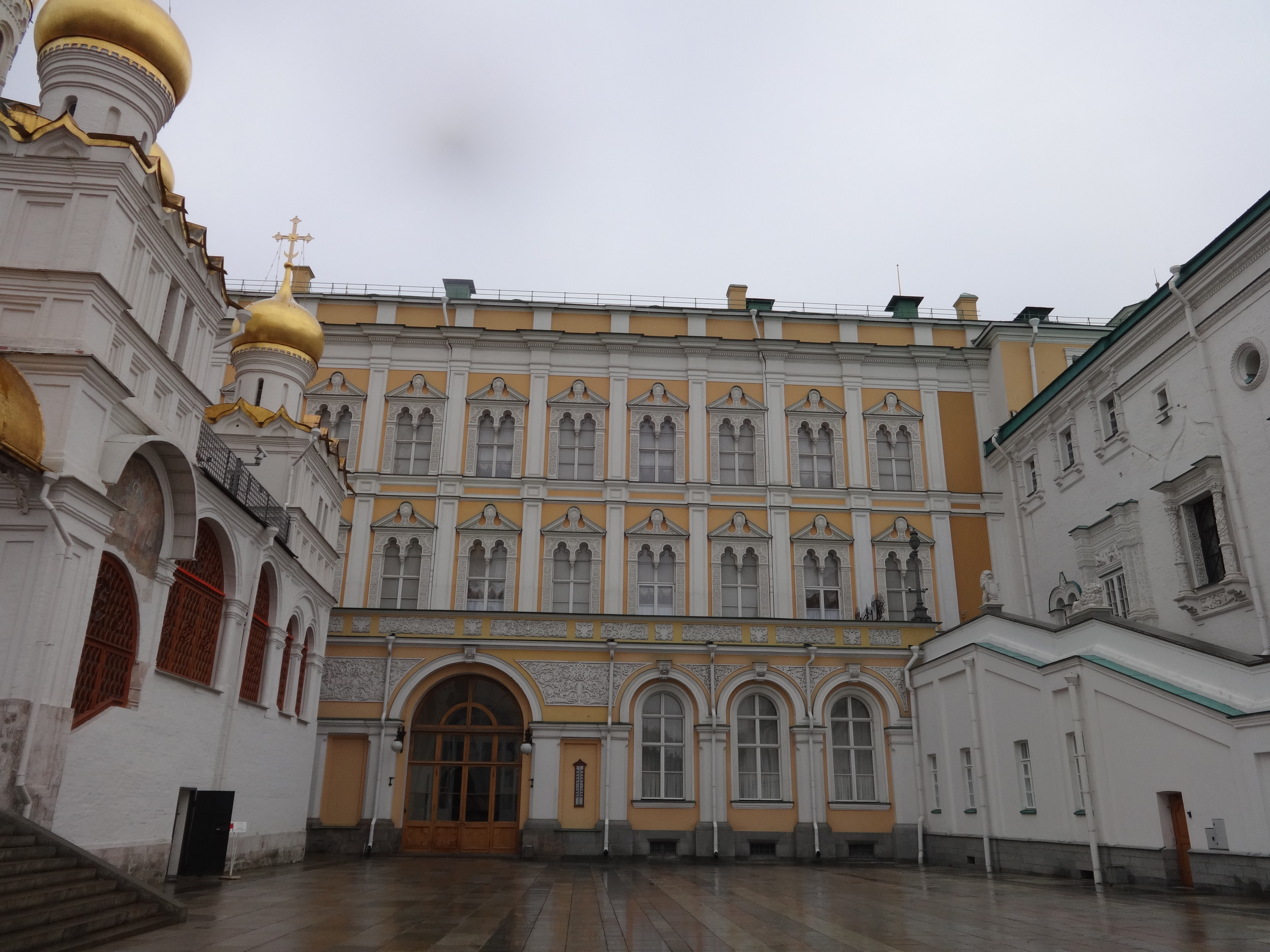 Большой Кремлевский дворец (Москва и Московская область, Москва, Красная площадь, Кремлевская наб., Александровский сад)